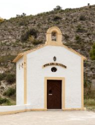 ermita de fatima